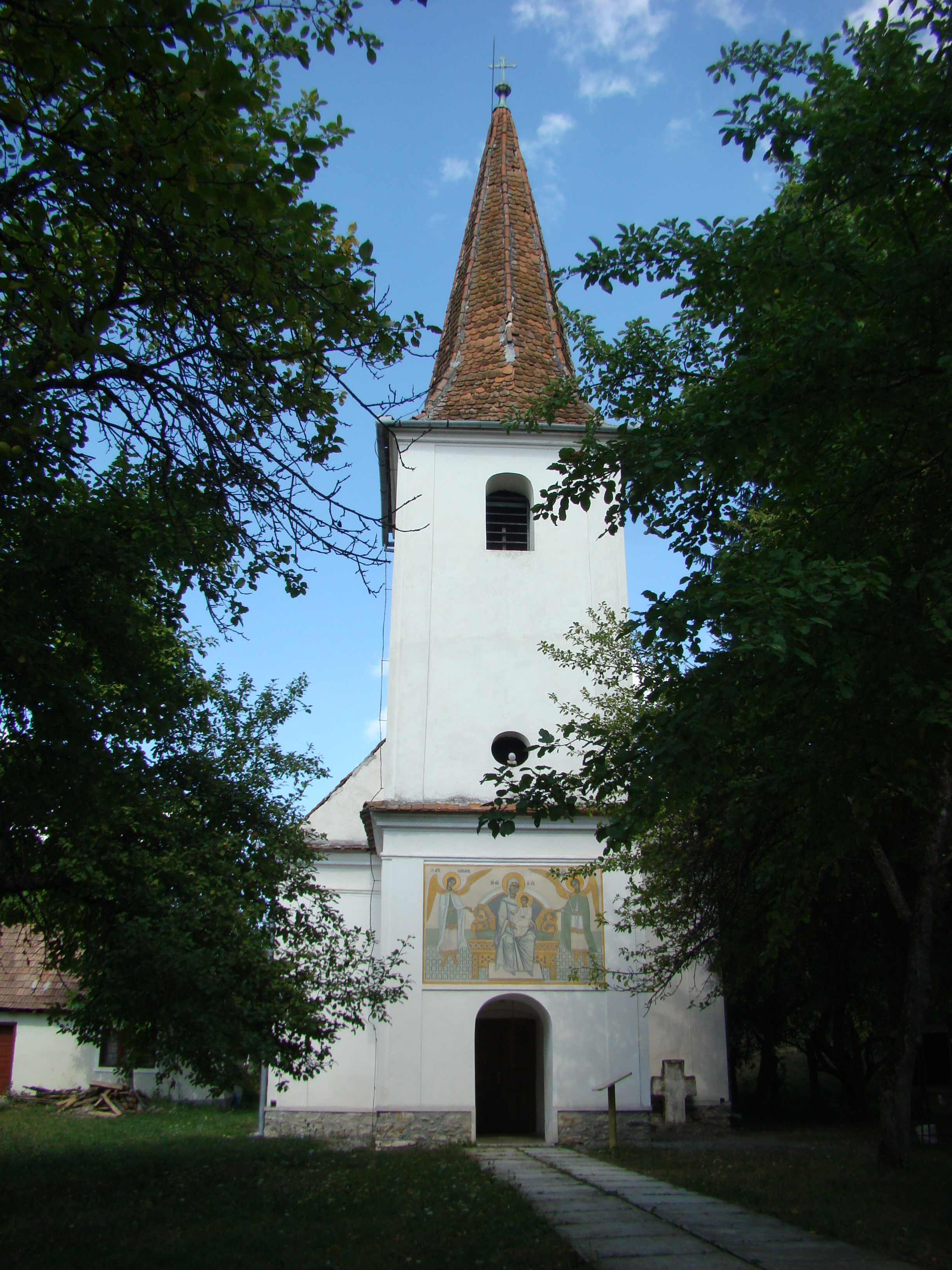 Biserica "Naşterea Domnului" , sat SĂRATA; comuna PORUMBACU DE JOS